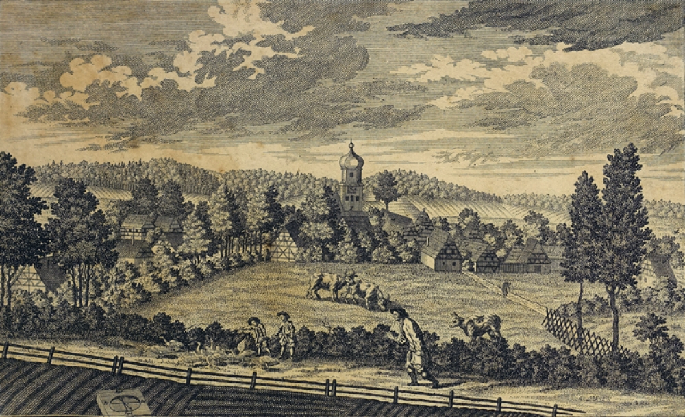 C. M. Roth, Altenthann um 1760 mit Kirche St. Veit Kupferstich, Motivgröße 15 x 25,5 cm, Maße mit Passepartout 17 x 26,5 cm, unsigniert